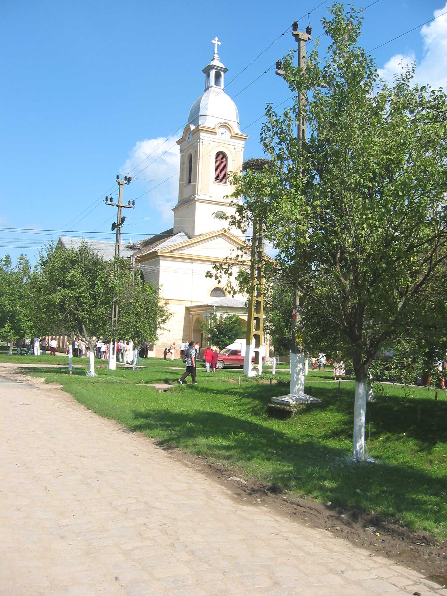 Katholische Kirche Billed